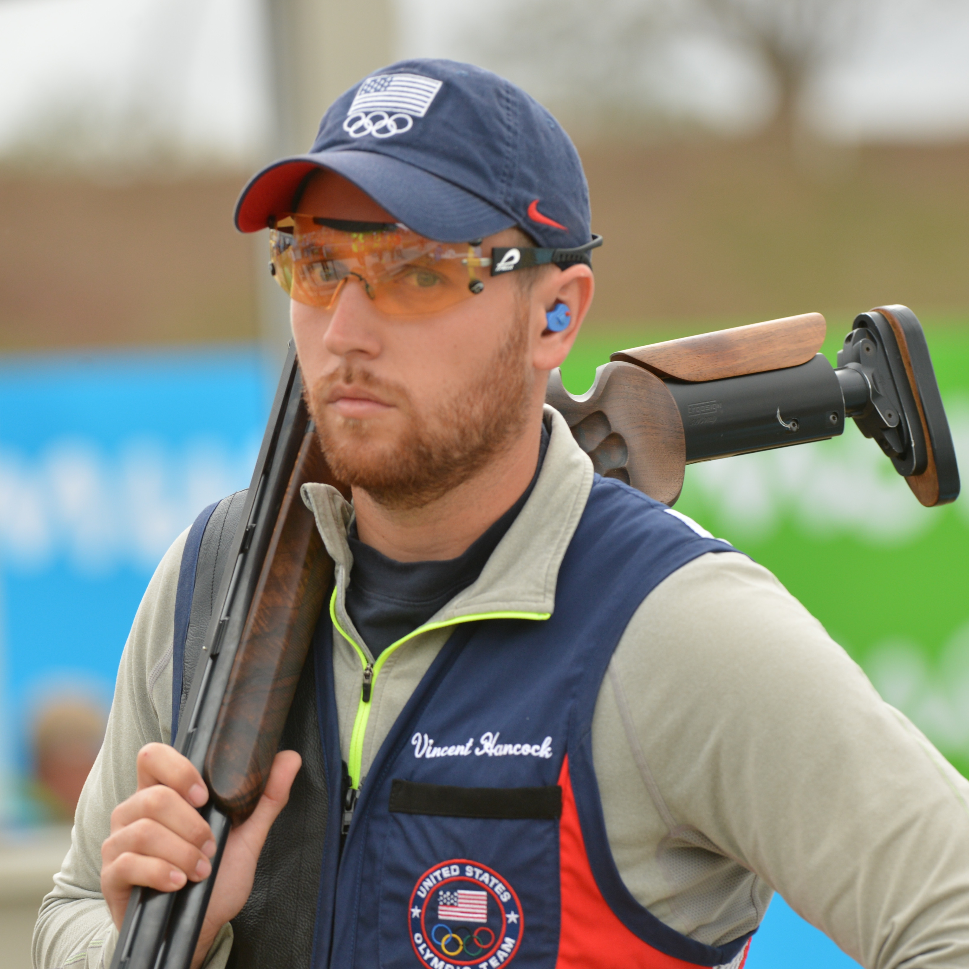 Hancock9055